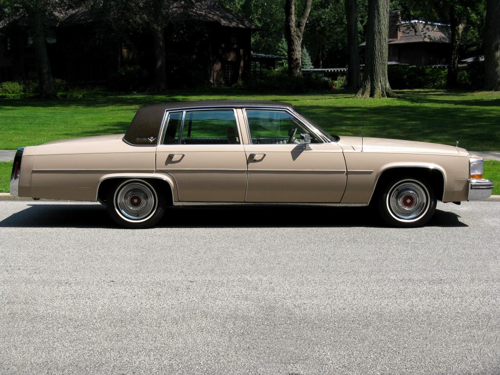 1980 Cadillac Sedan DeVille